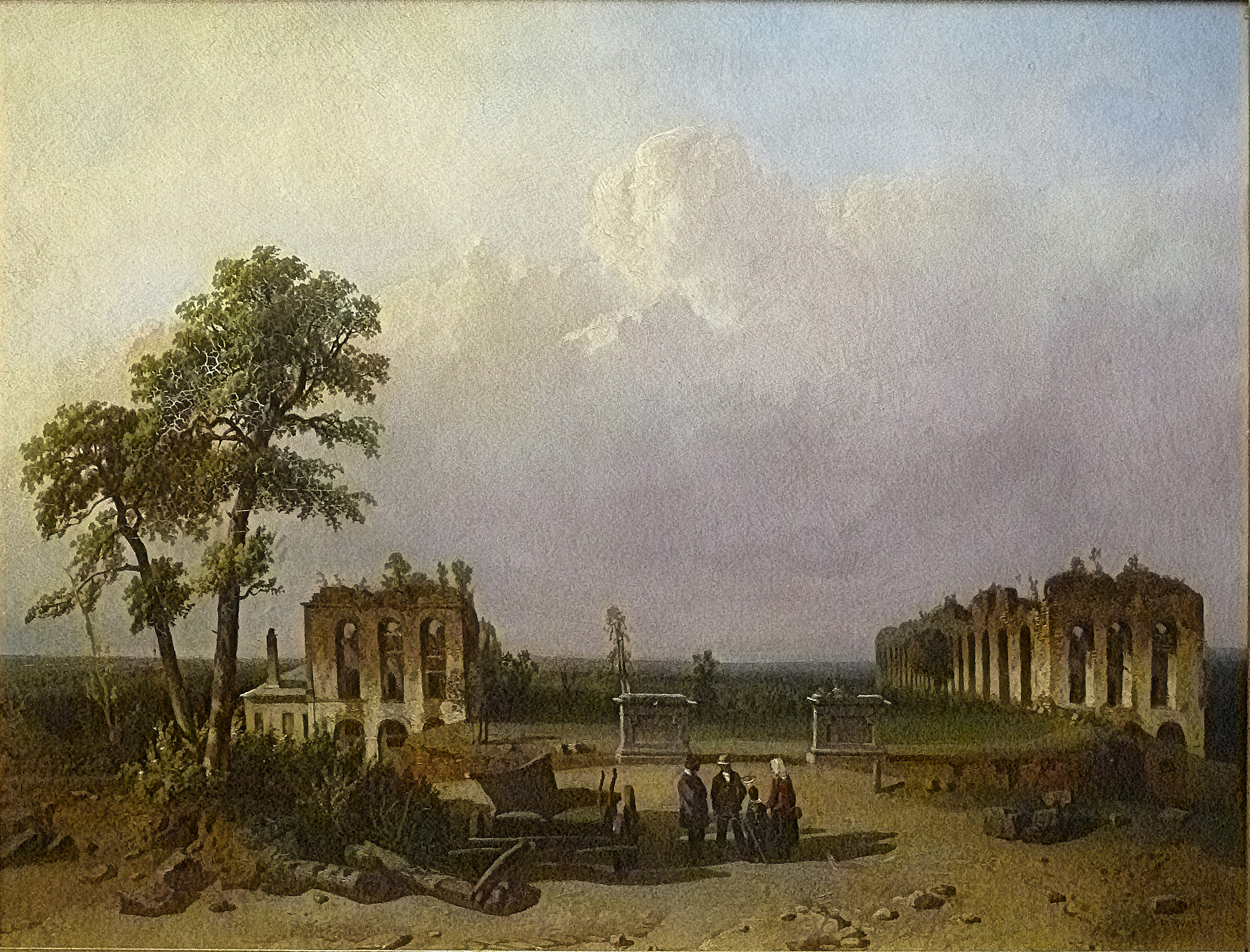 "Ruines de Mariemont", huile sur bois par Joseph Tavernier (1859)